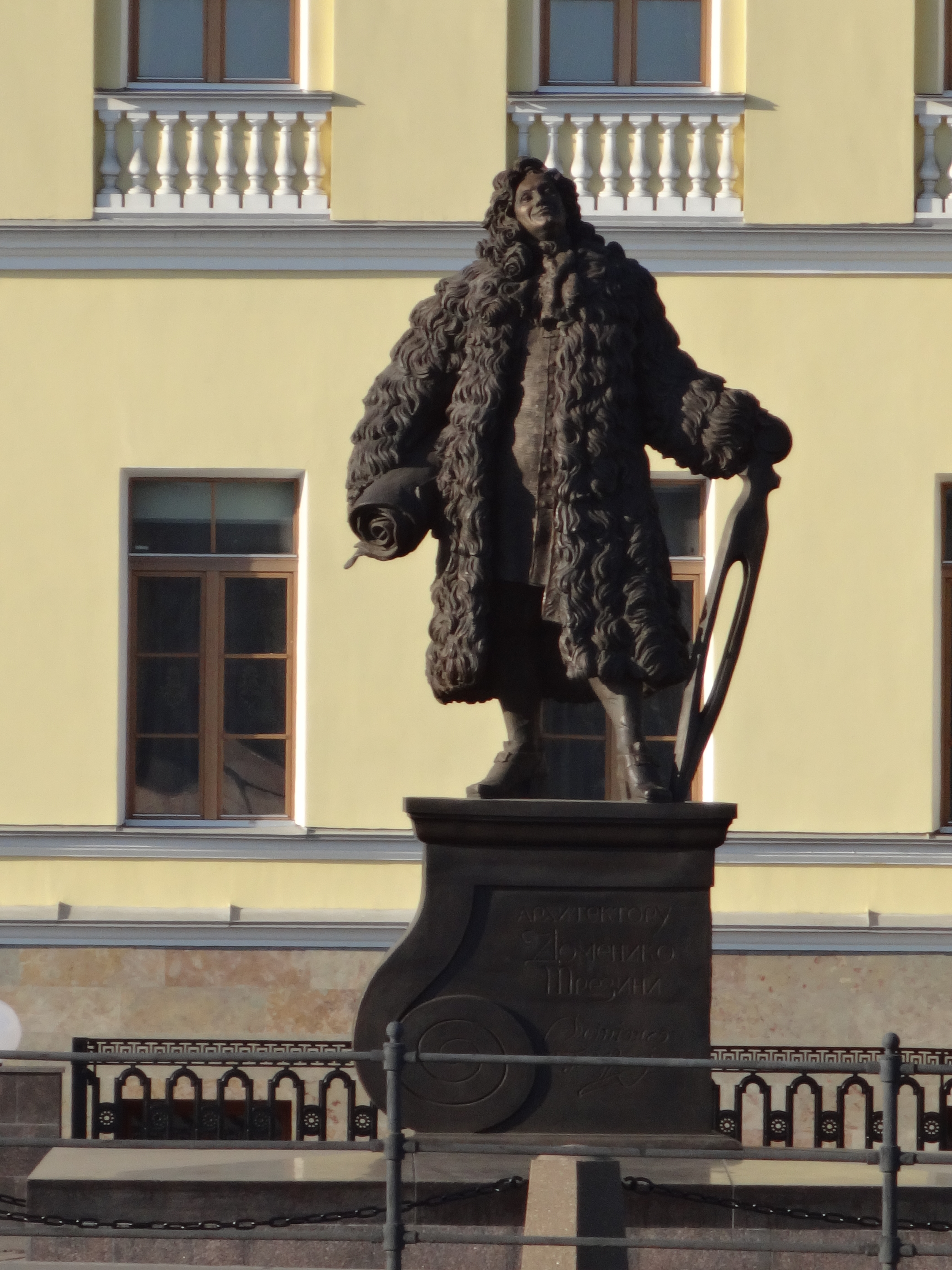 Дом архитектора Д. А. Трезини (Санкт-Петербург и Лен.область, Санкт-Петербург, Университетская наб., 21, Академический переулок, 4)